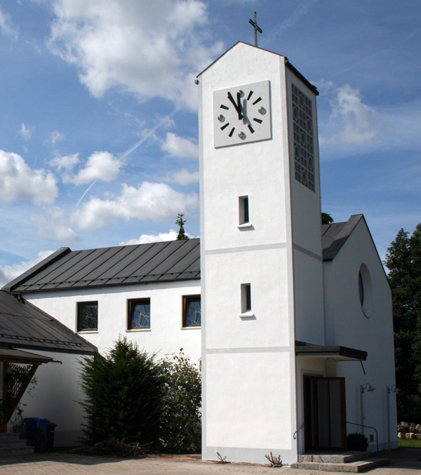 Außenansicht der Alt-Katholischen Pfarrkirche St. Peter und Paul in Weidenberg (Oberfranken)